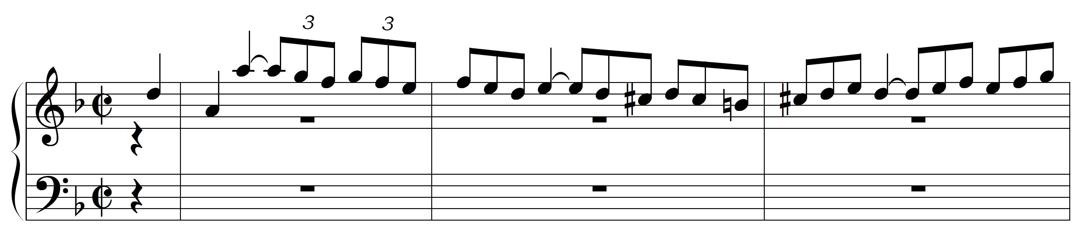 Bach, JS, Incipit Contrapunctus 13,2, BWV 1080